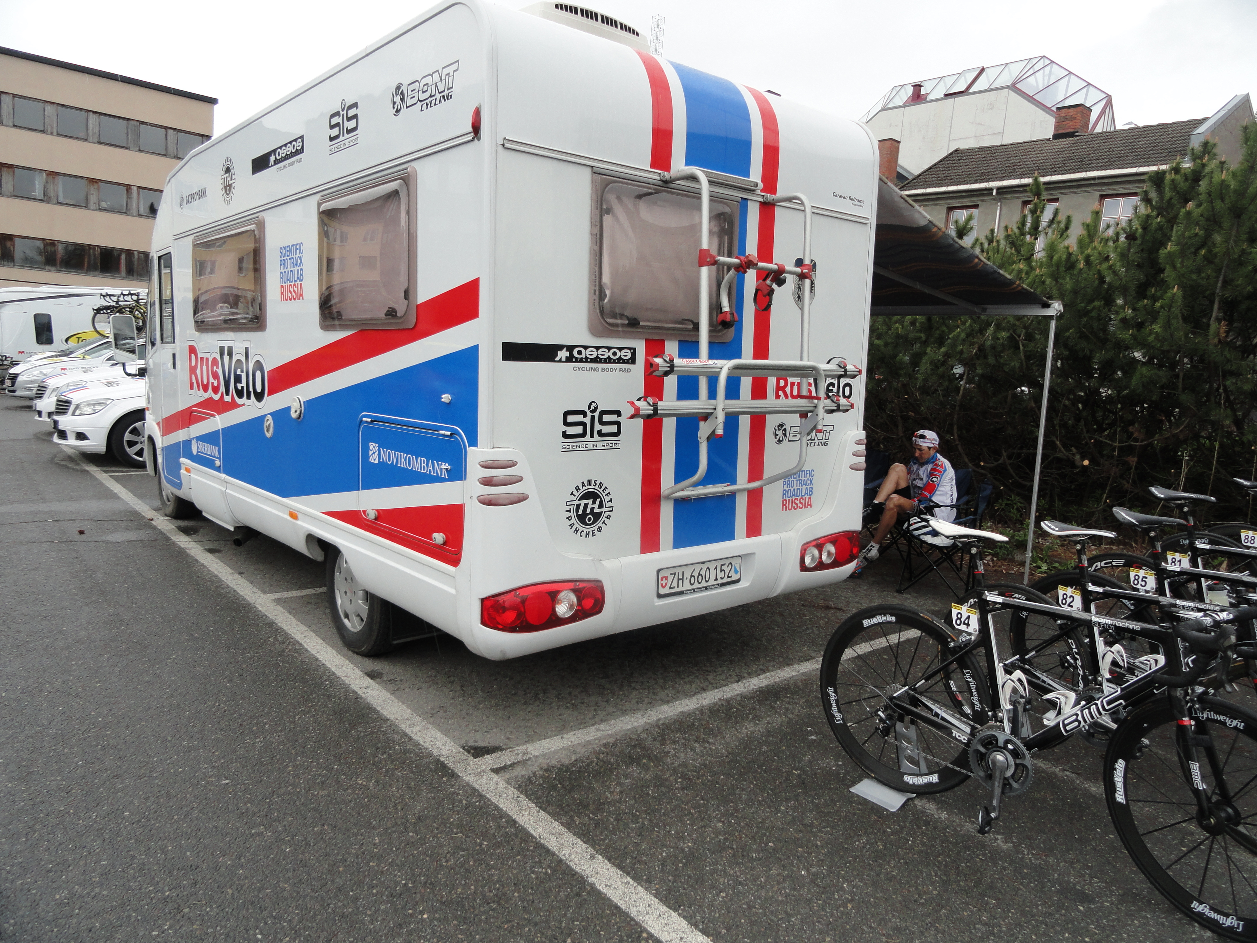 Bilde av RusVelos campingvogn under etappe 4 av Tour of Norway 2012.